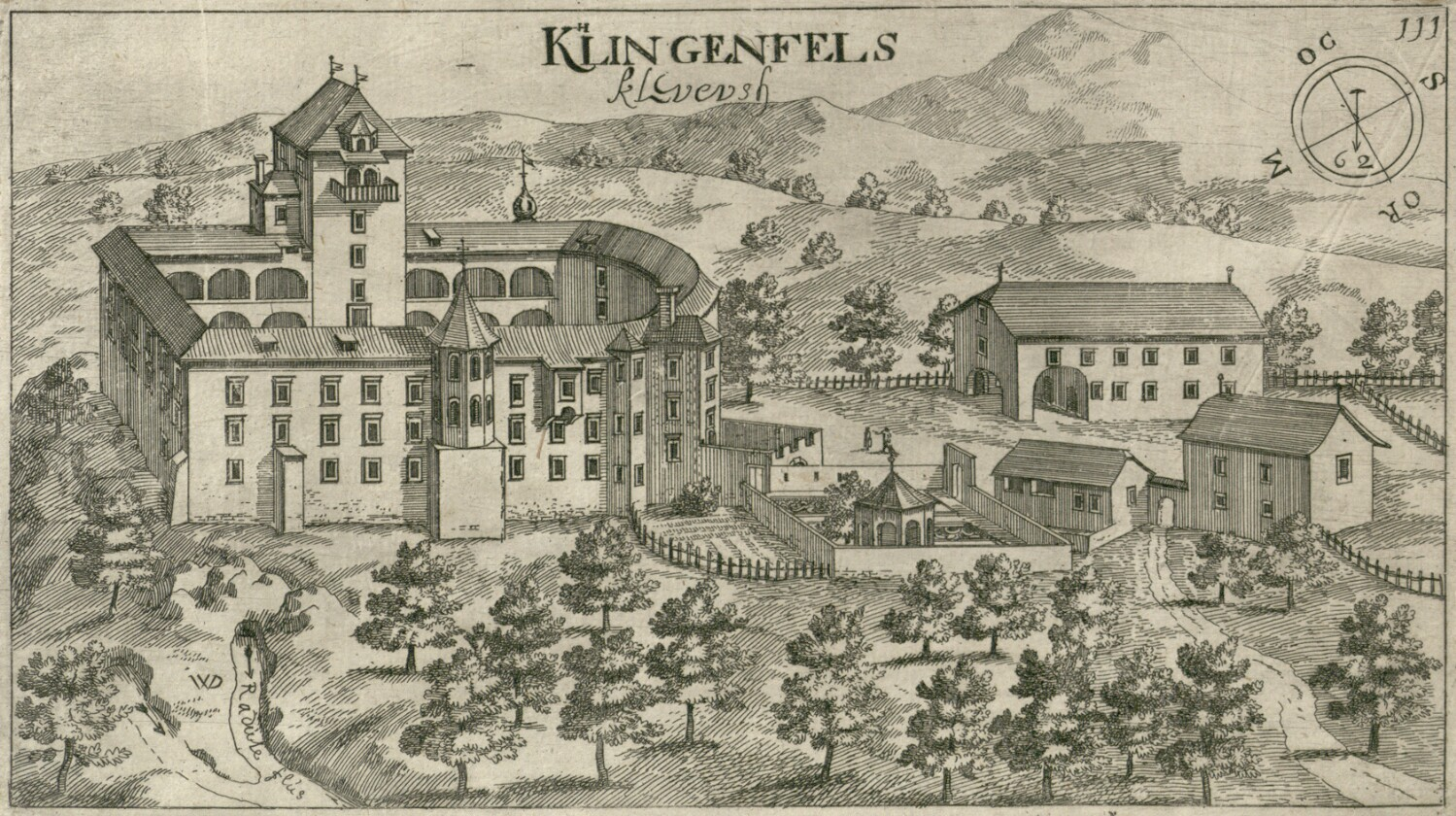 Grad Klevevž